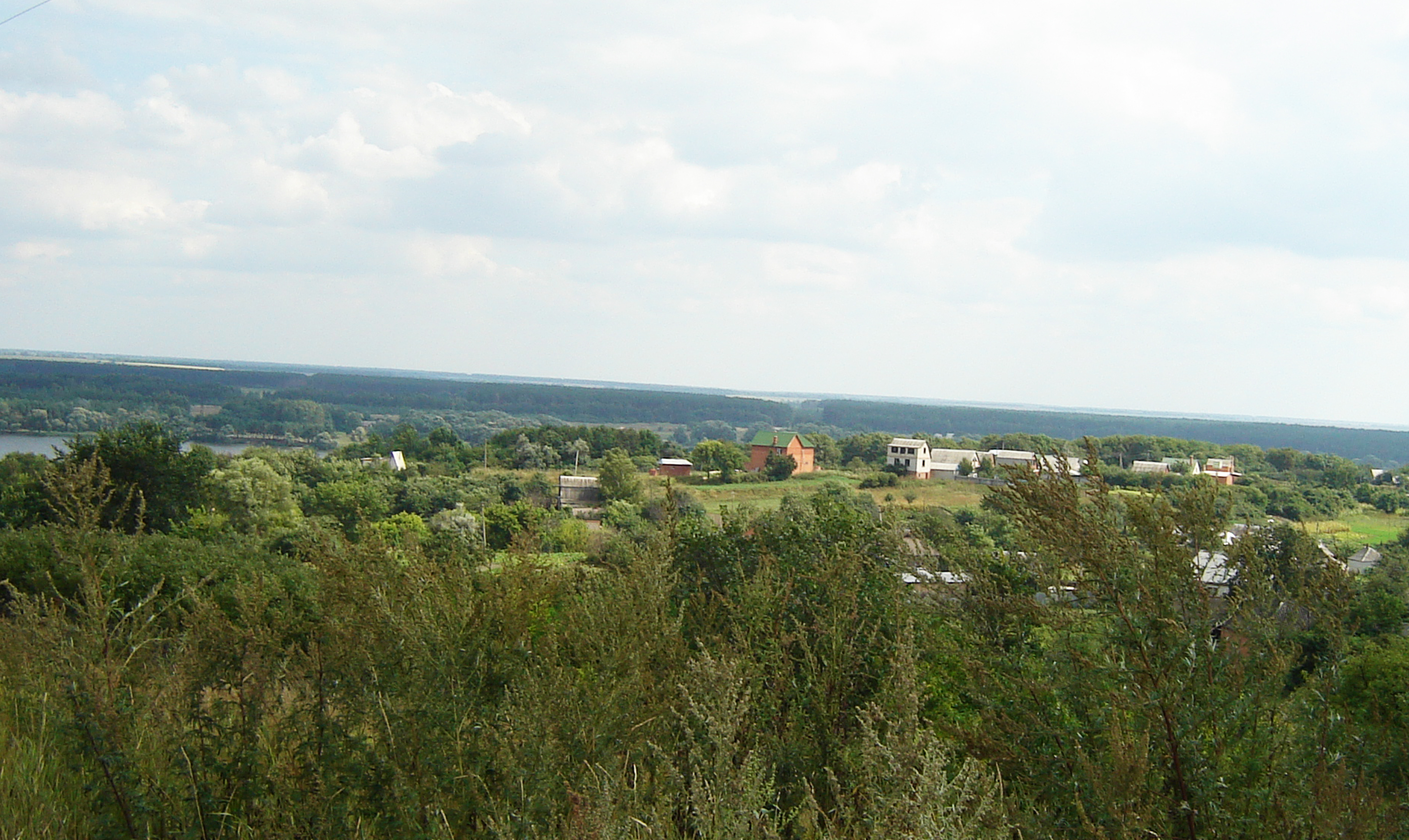 Городище в с. В.Салтів